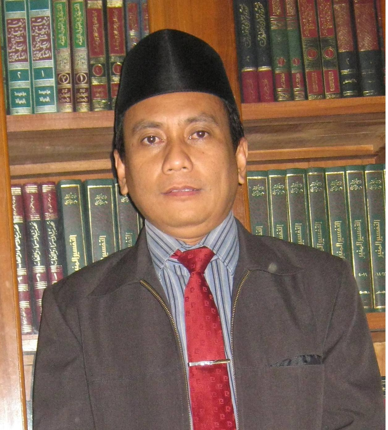 Abu Yasid